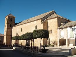 Exterior de la Iglesia